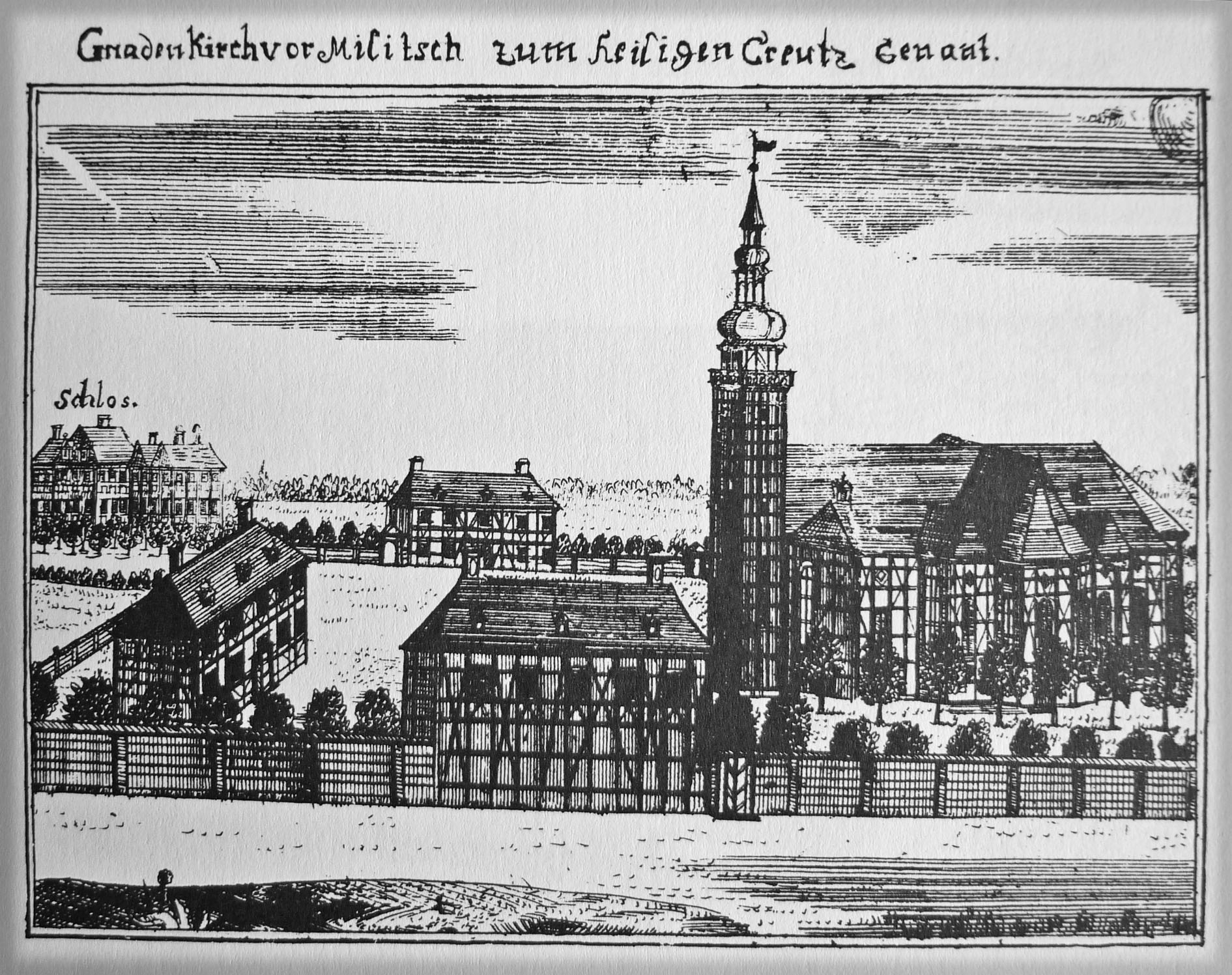 Gnadenkirche in Militsch (Schlesien) aus Friedrich Bernhard Werner: Schlesische Bethäuser (1748-52)